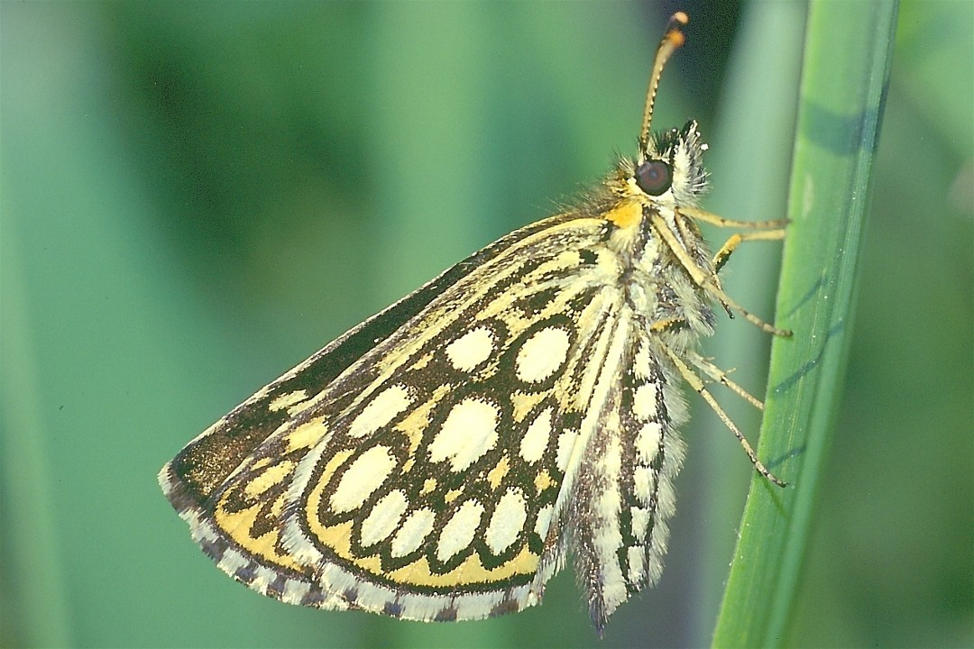 Spiegelfleck-Dickkopffalter (Heteropterus morpheus)